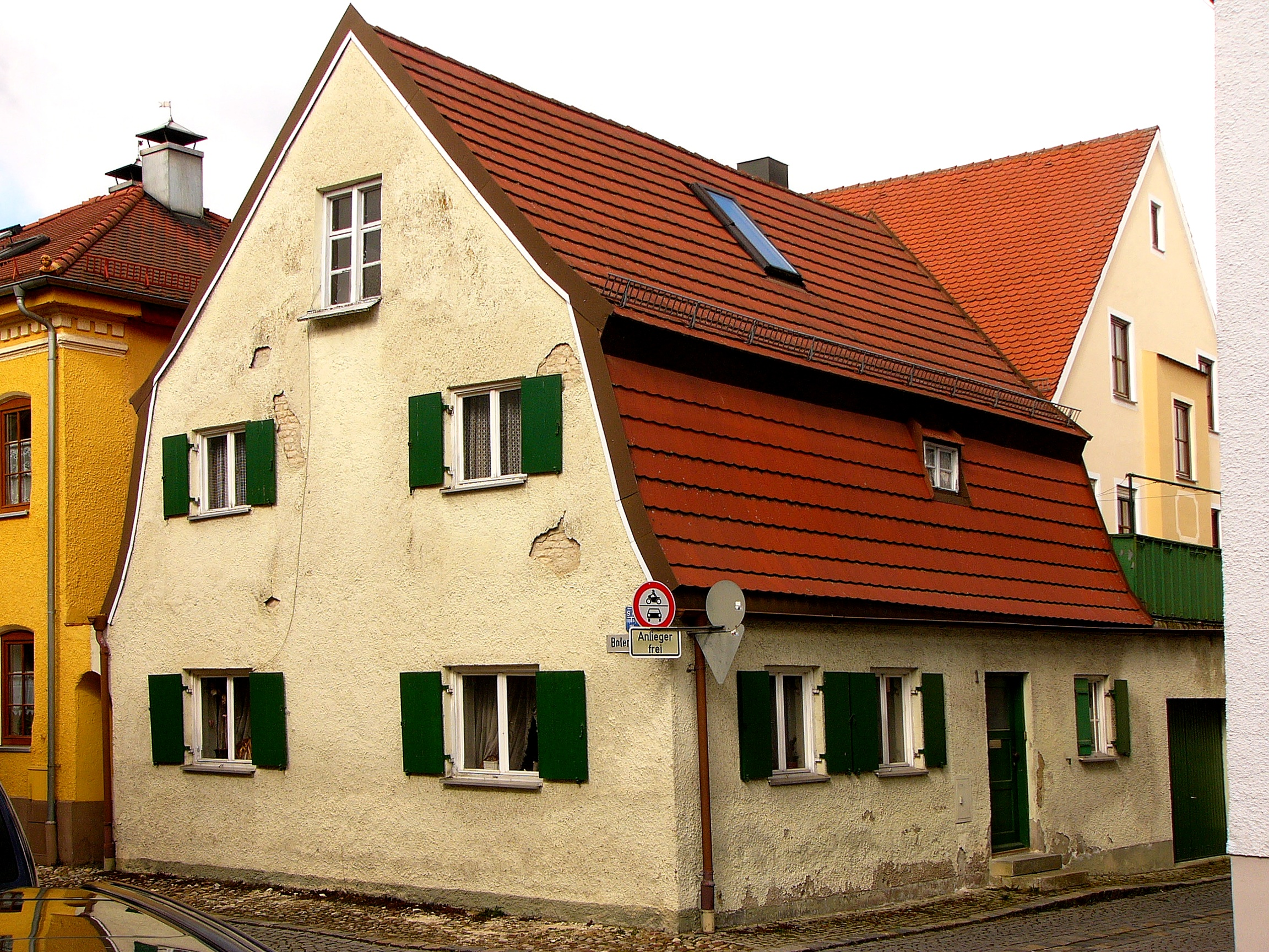 Wohnhaus; erdgeschossiger Mansarddachbau, vor 1813; siehe auch Ensemble Botengasse. This is a photograph of an architectural monument.